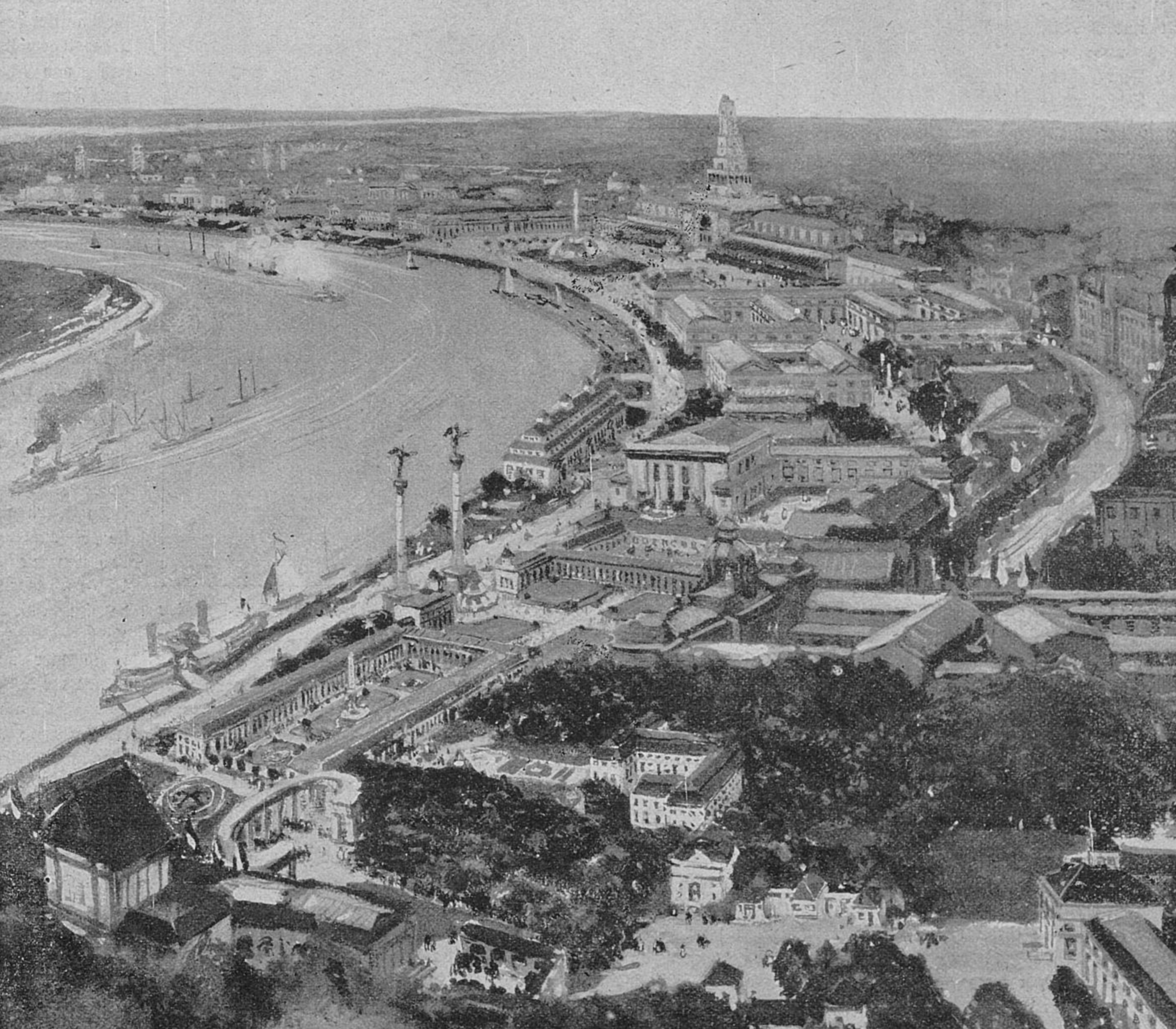 Gesamtansicht der Großen Ausstellung Düsseldorf 1915. Nach einem Aquarell von Professor Heinrich Hermanns. Rhein und Düssel, vom 16. Mai 1914